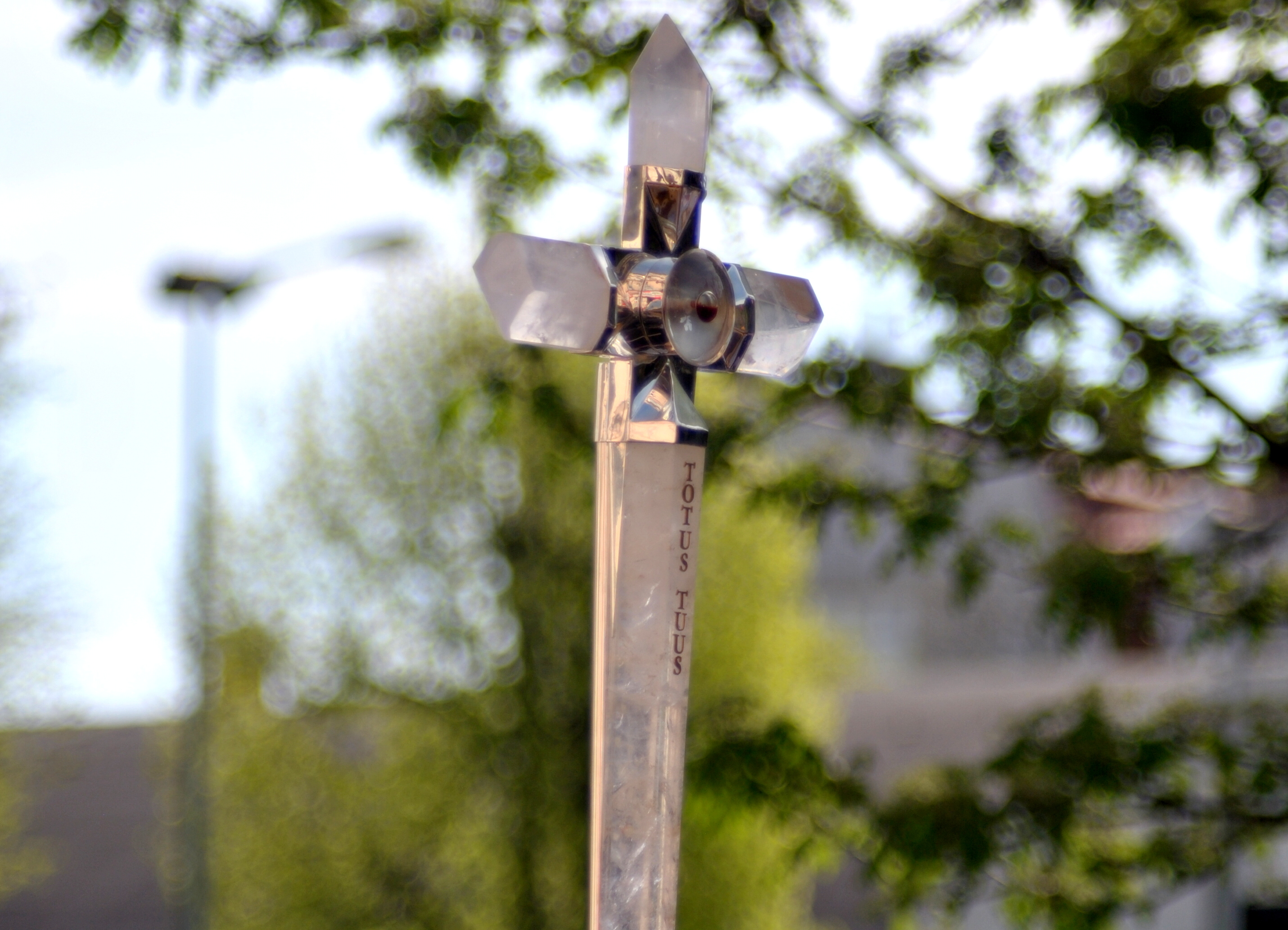 Relikwiarz krwi bł. Jana Pawła II